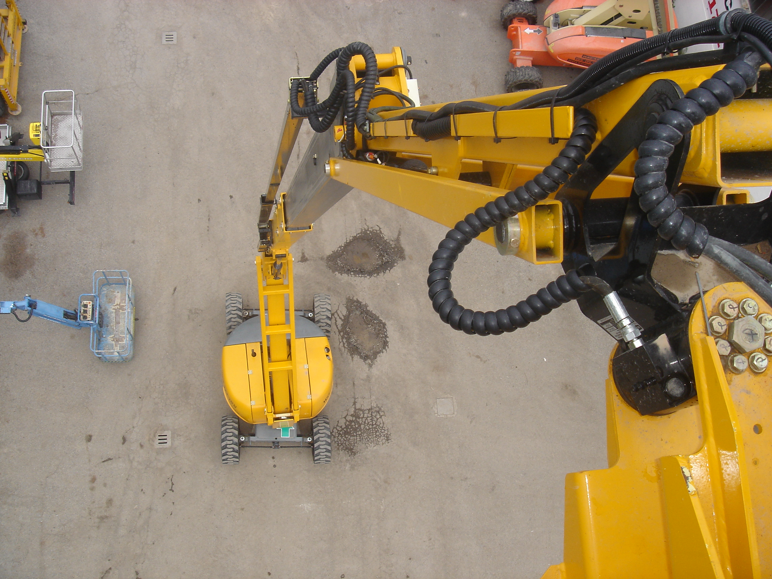 foto fatta da me